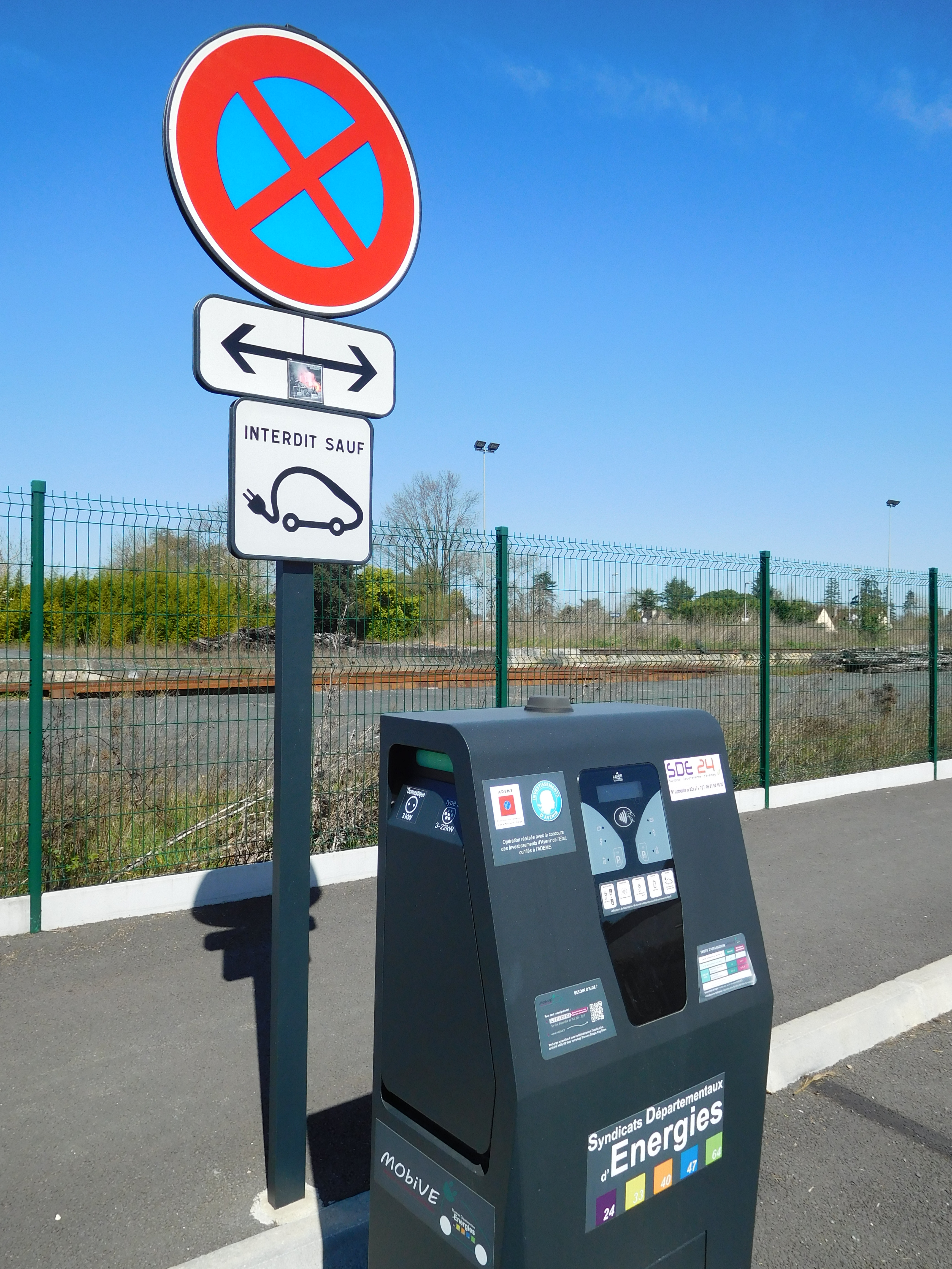 Borne de recharge près de la gare de Mussidan, Dordogne, France. Inscriptions sur la borne : opération réalisée avec le concours des investissements d'avenir de l'État, confiés à l'Ademe ; syndicat départemental d'énergies de la Dordogne (SDE 24).